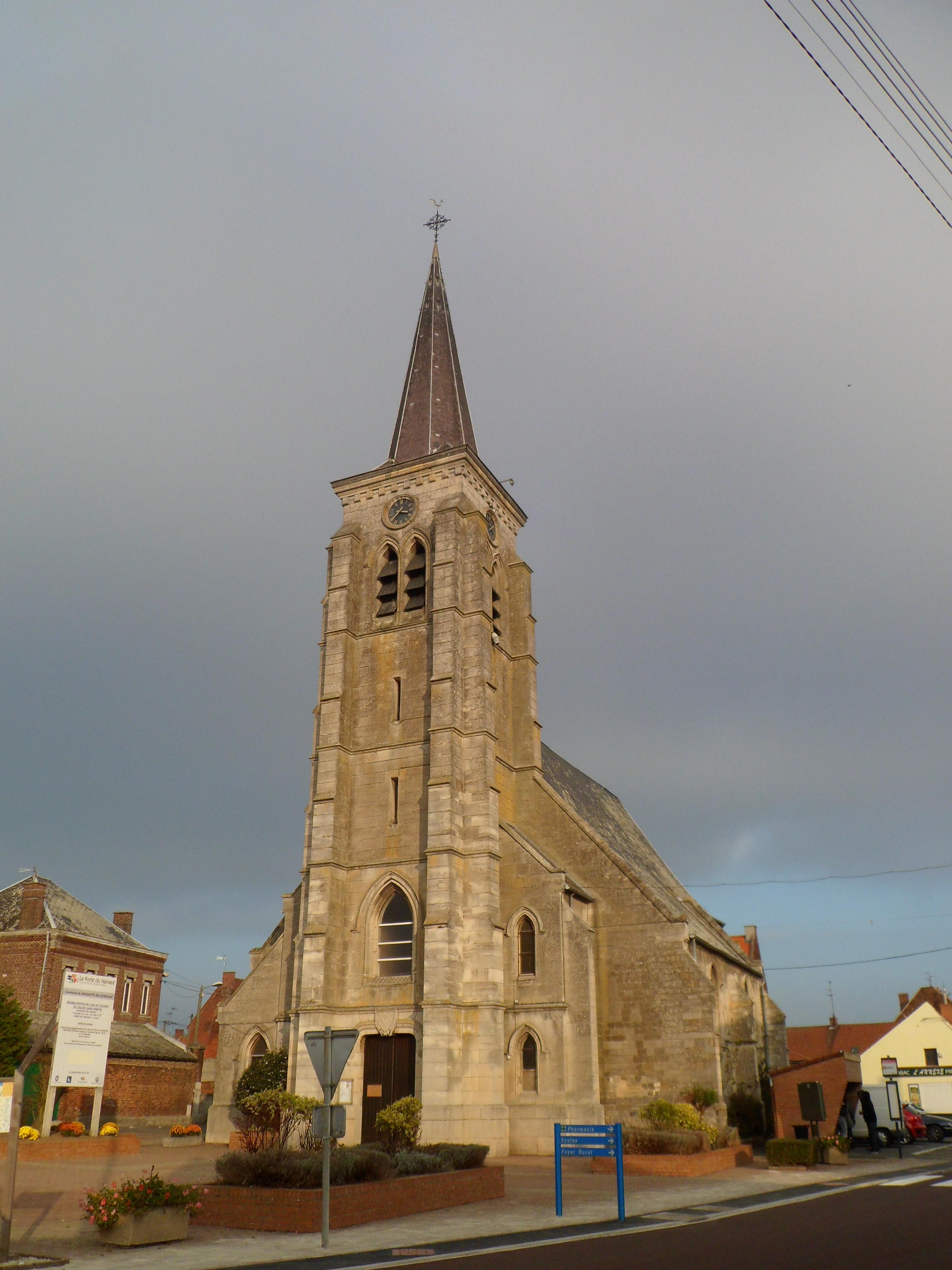 Église de Marquette-en-Ostrevant